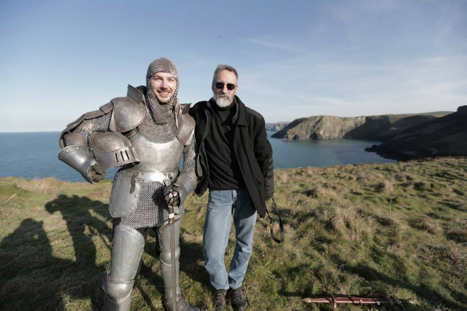 Alexis Metzinger et John Howes sur le tournage